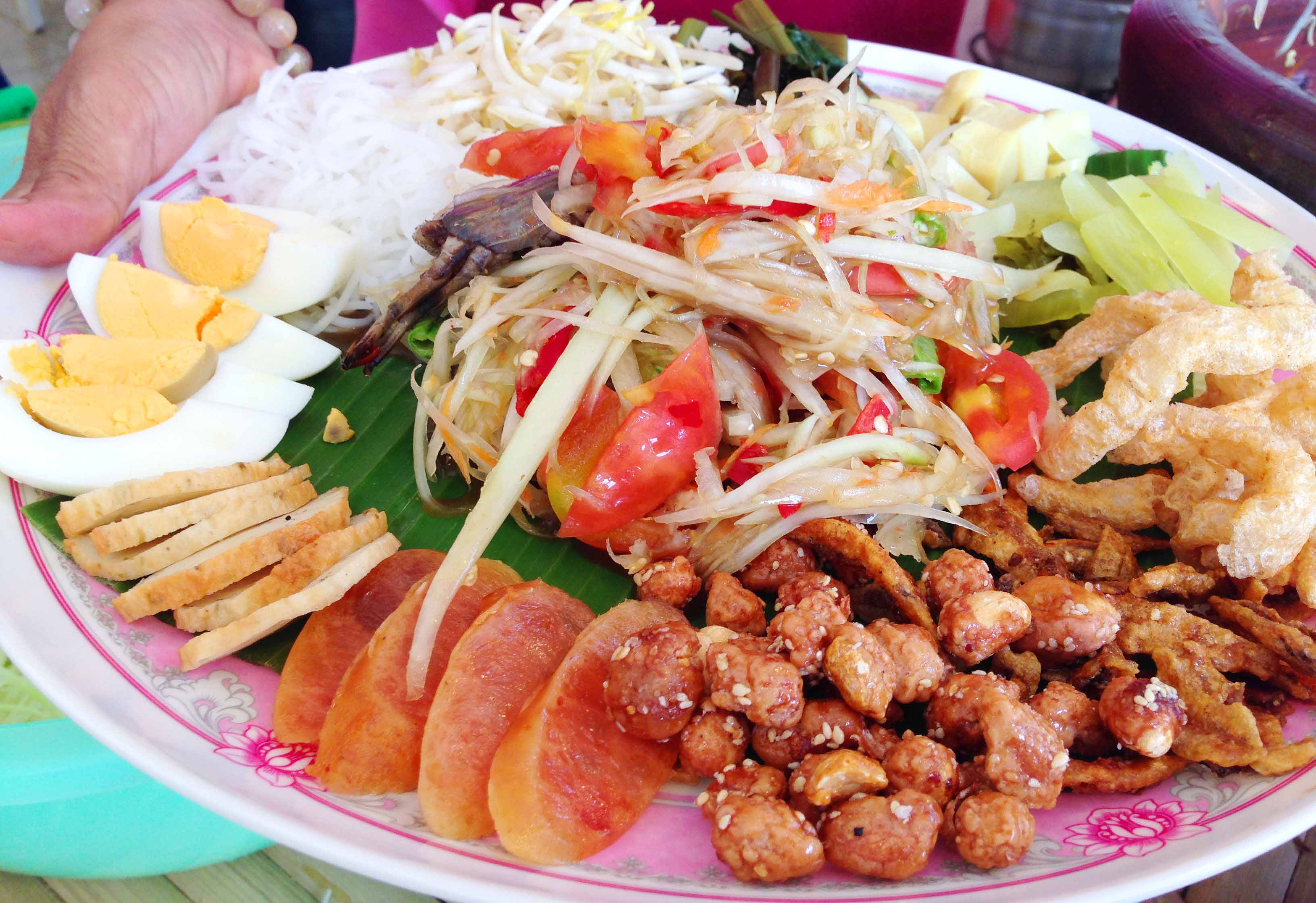 ส้มตำ ตำถาด